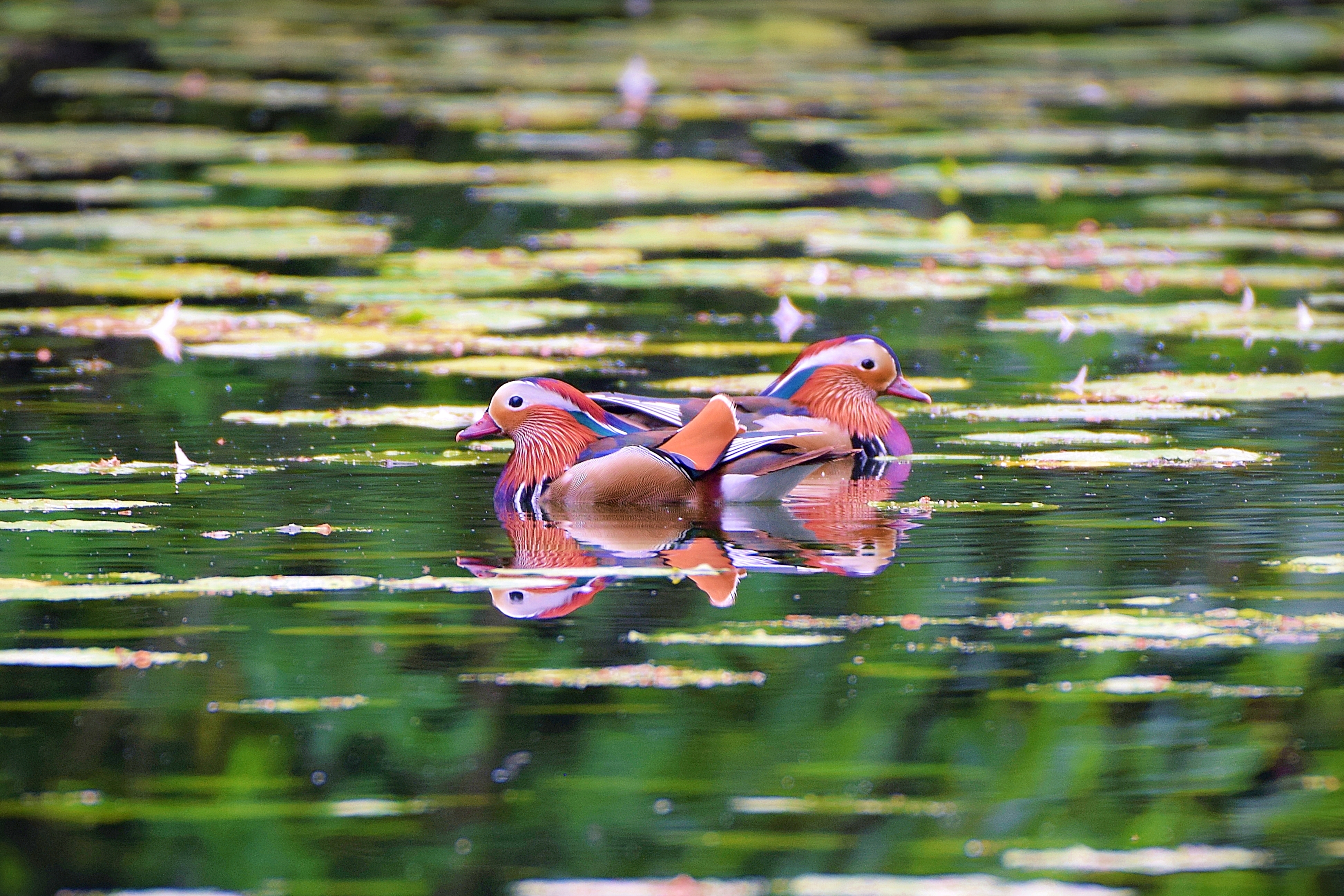 Deux mâles à la fin mai sur une mâre en forêt en région bruxelloise